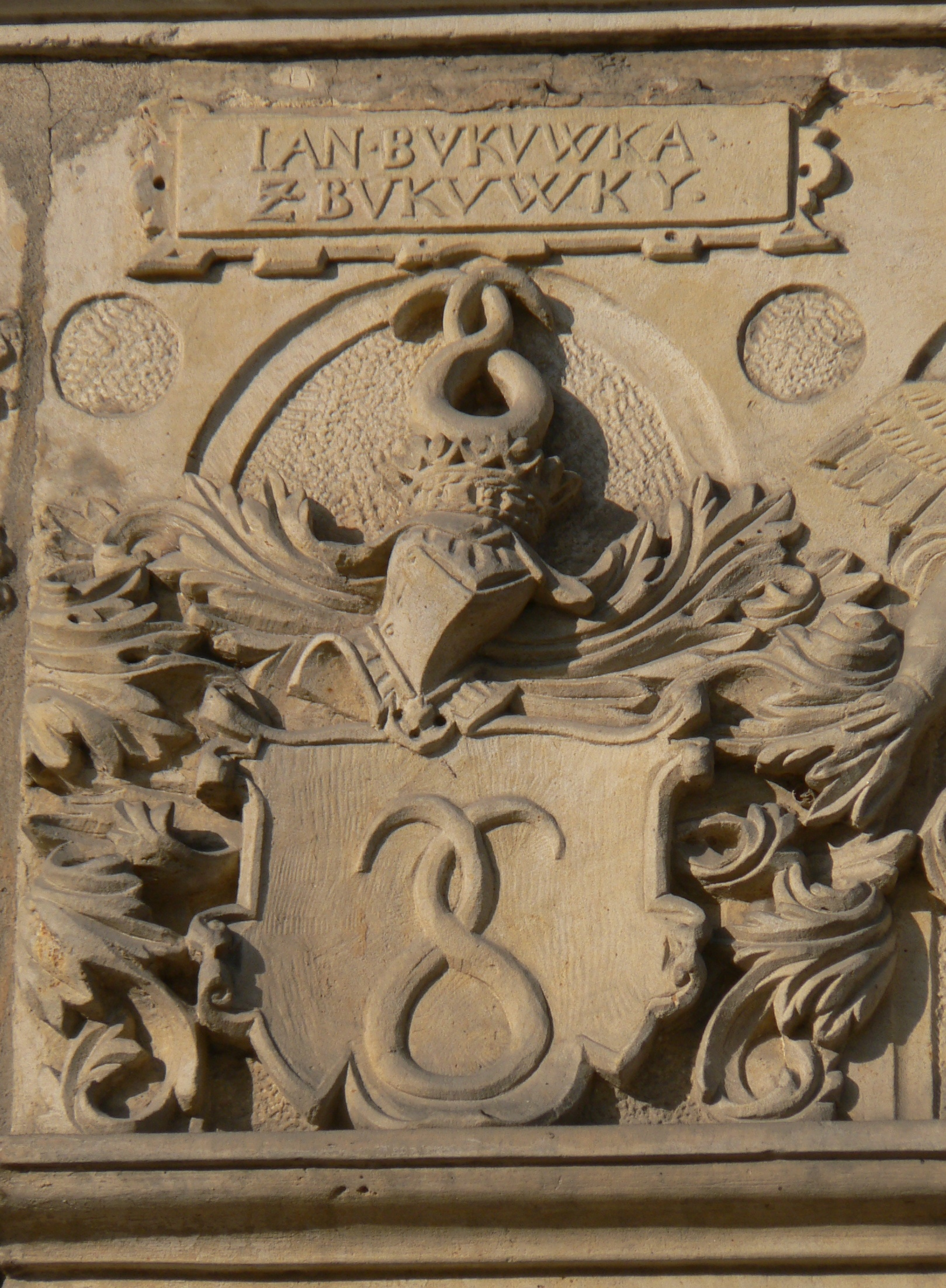 Erb Jana Bukůvky z Bukůvky, renesanční portál zámku v Třemešku u Šumperka